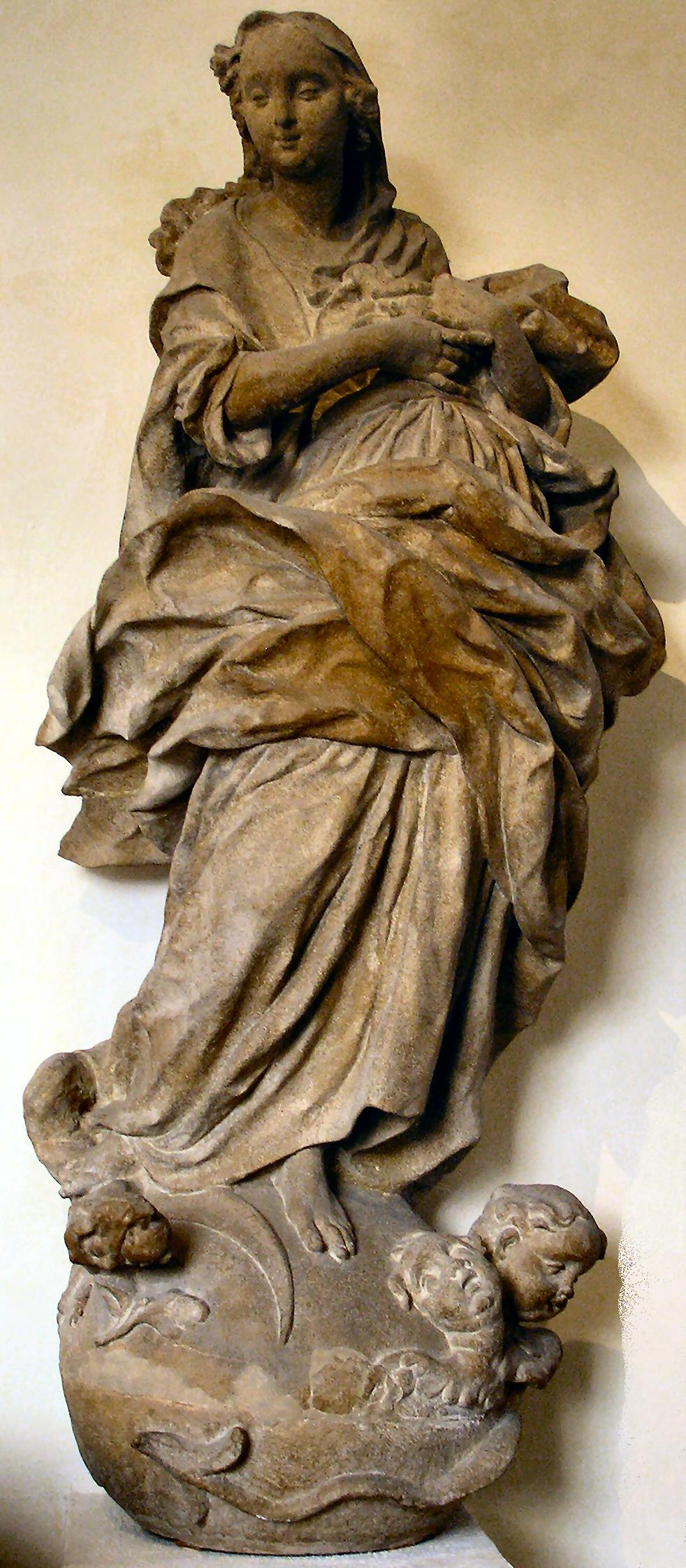 Maria Immaculata, Sandstein, Freiburg, Haus "zur lieben Hand", Fidelis Sporer, ca 1770